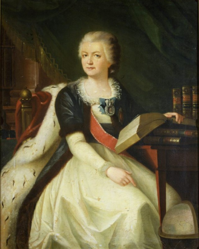 Portrait of the Princess Yekaterina R. Vorontsova-Dashkova (1744-1810) Местонахождение: Russian State Archive of Literature and Art, Moscow - или ГИМ? Портрет княгини Е.Р. Дашковой Неизвестный художник, 1790-е гг.